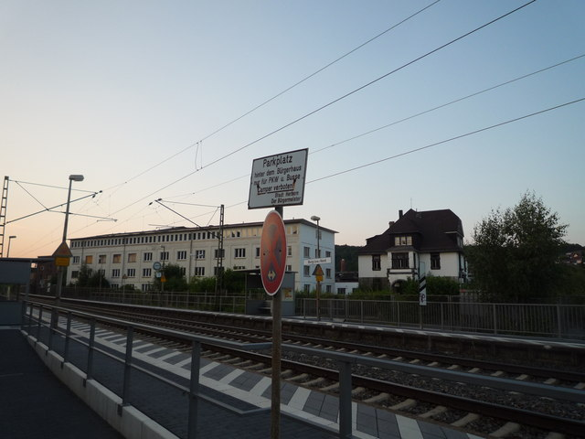 Bahnhof in Burg